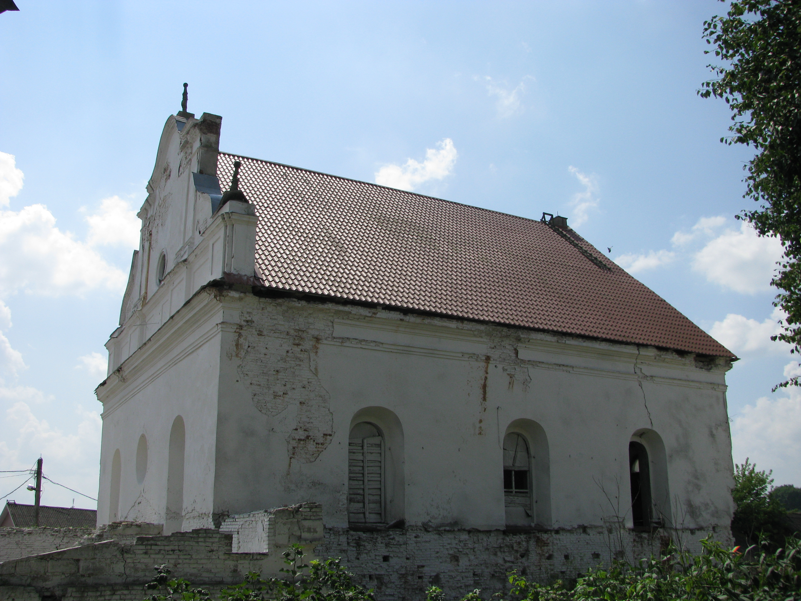 Беларуская (тарашкевіца): Будынак былой сынагогідэкаратыўнае аздабленьне:фрэскавыя кампазыцыі, арнамэнтальная лепка. г. Слонім This is a photo of Belarusian heritage monument. Reference number: 412Г000509 ( WLM)